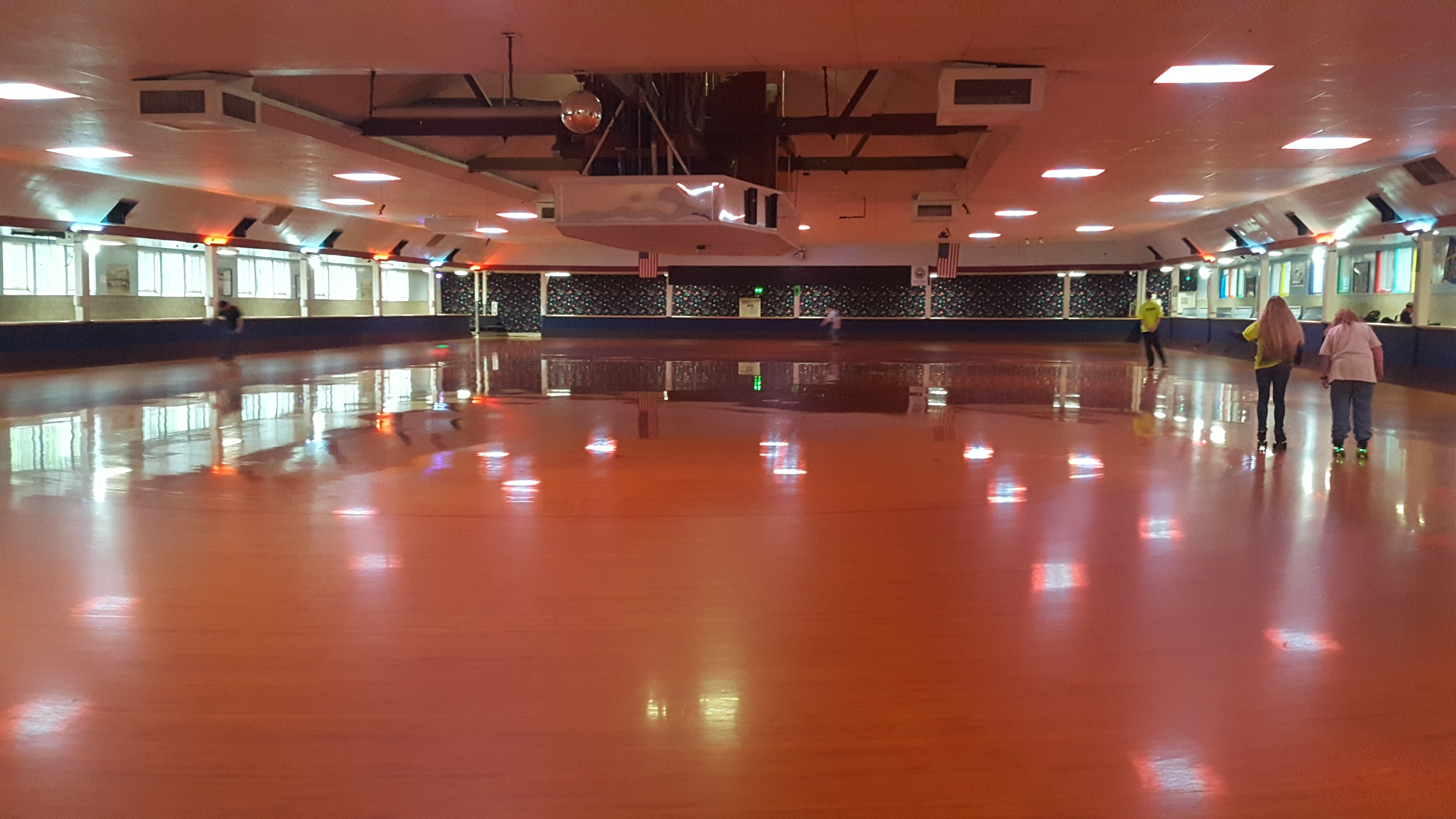 Roller rink